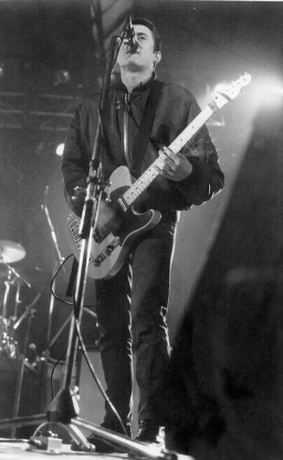 Fermin Muguruza durante un concierto de Kortatu.